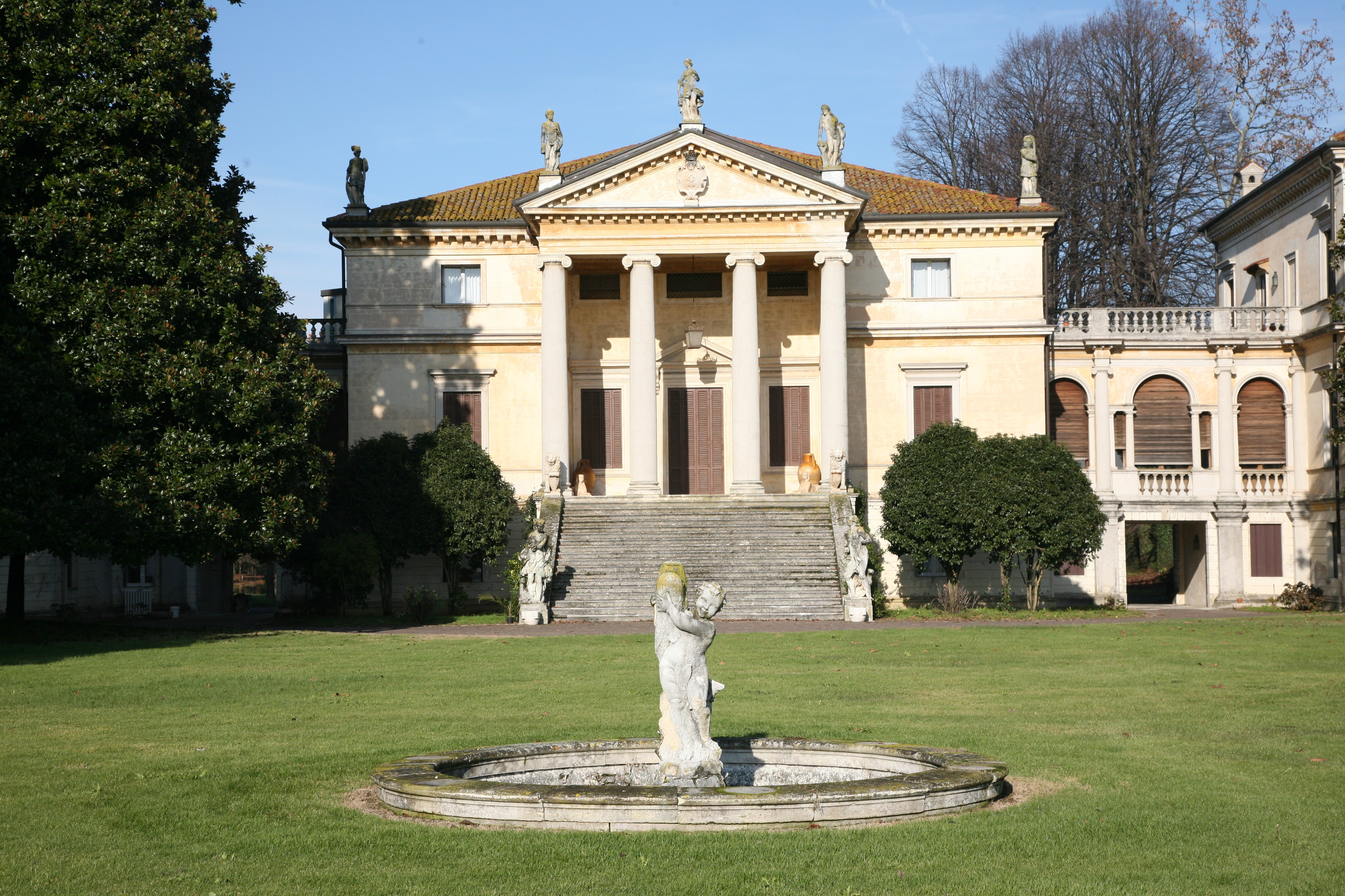 Villa Porto in Vivaro di Dueville north of Vicenza is traditionally attributed to Andrea Palladio